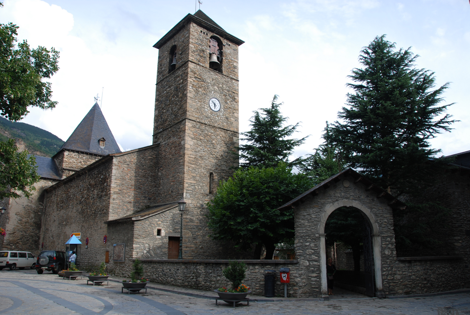 Aragonés: Ilesia de Benás